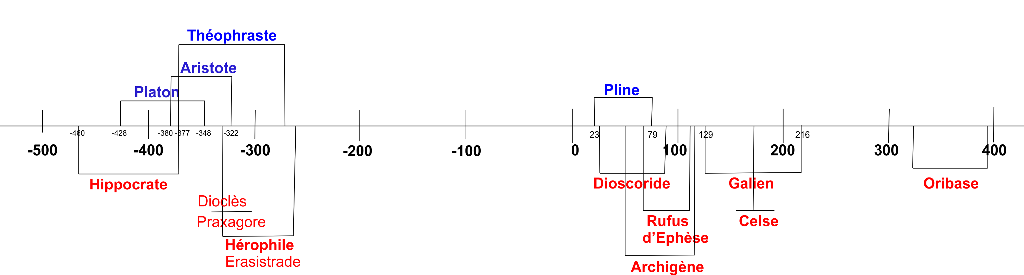 Positions temporelles relatives